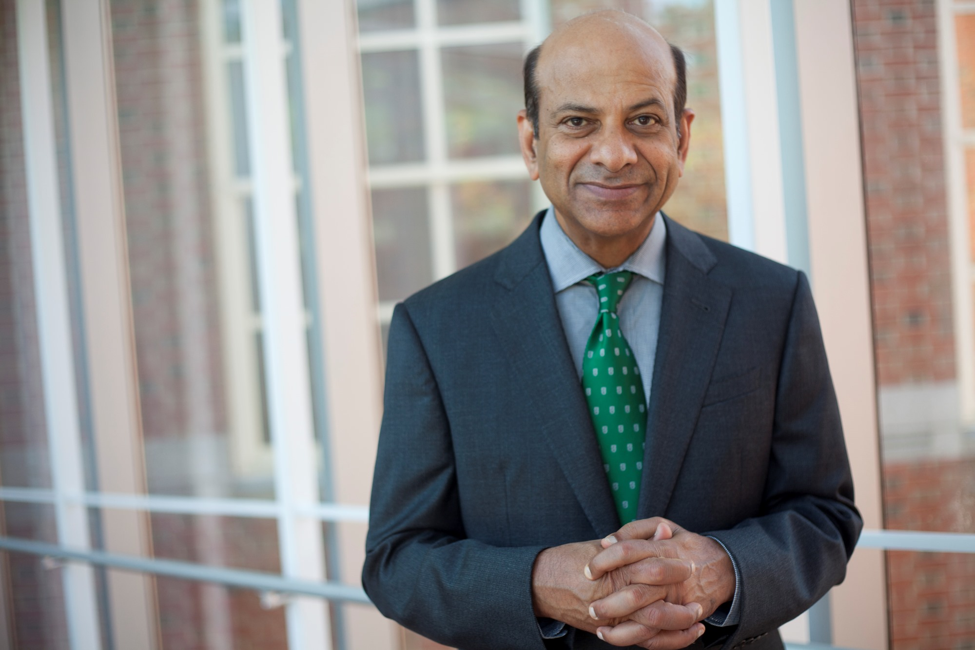 Prof Vijay Govindarajan